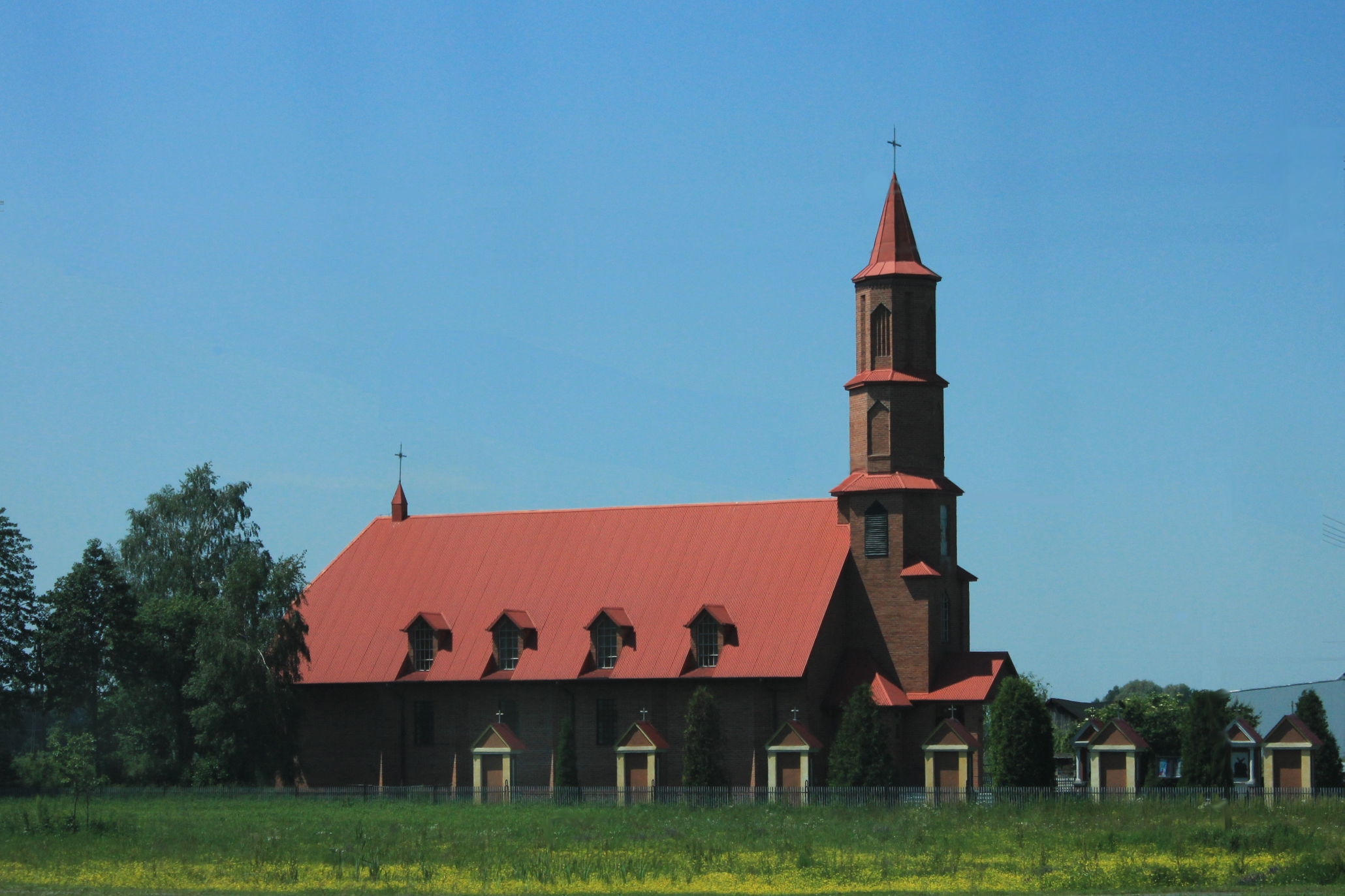 Żabce, ul. Staromiejska 11 - rzymskokatolicki kościół filialny pw. św. Józefa, 1995.